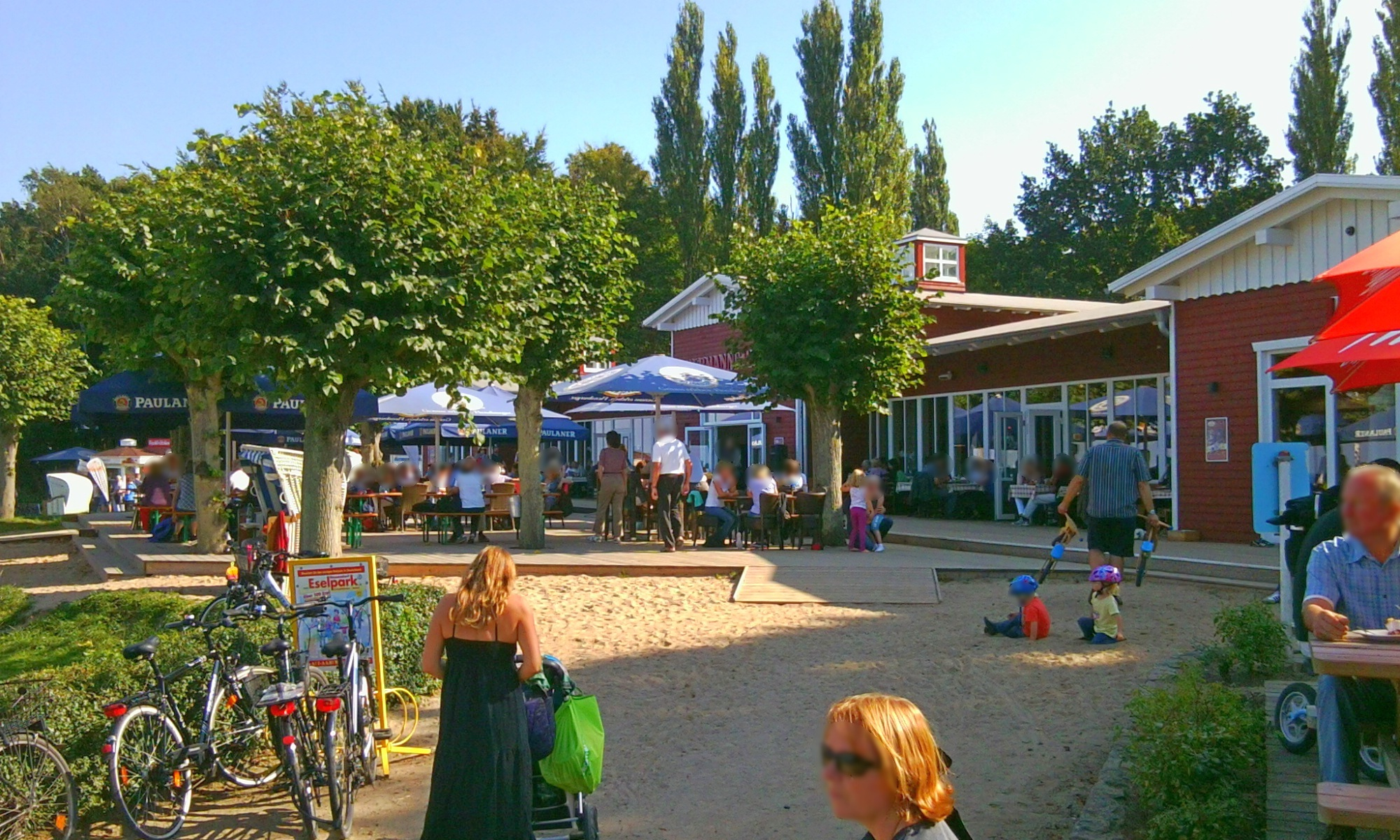 Brodten/Ausflugslokal Hermannshöhe nach Neubau 2012